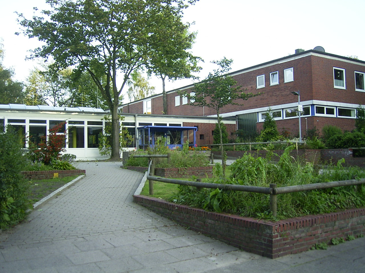 Schule Möllner Landstraße in Billstedt